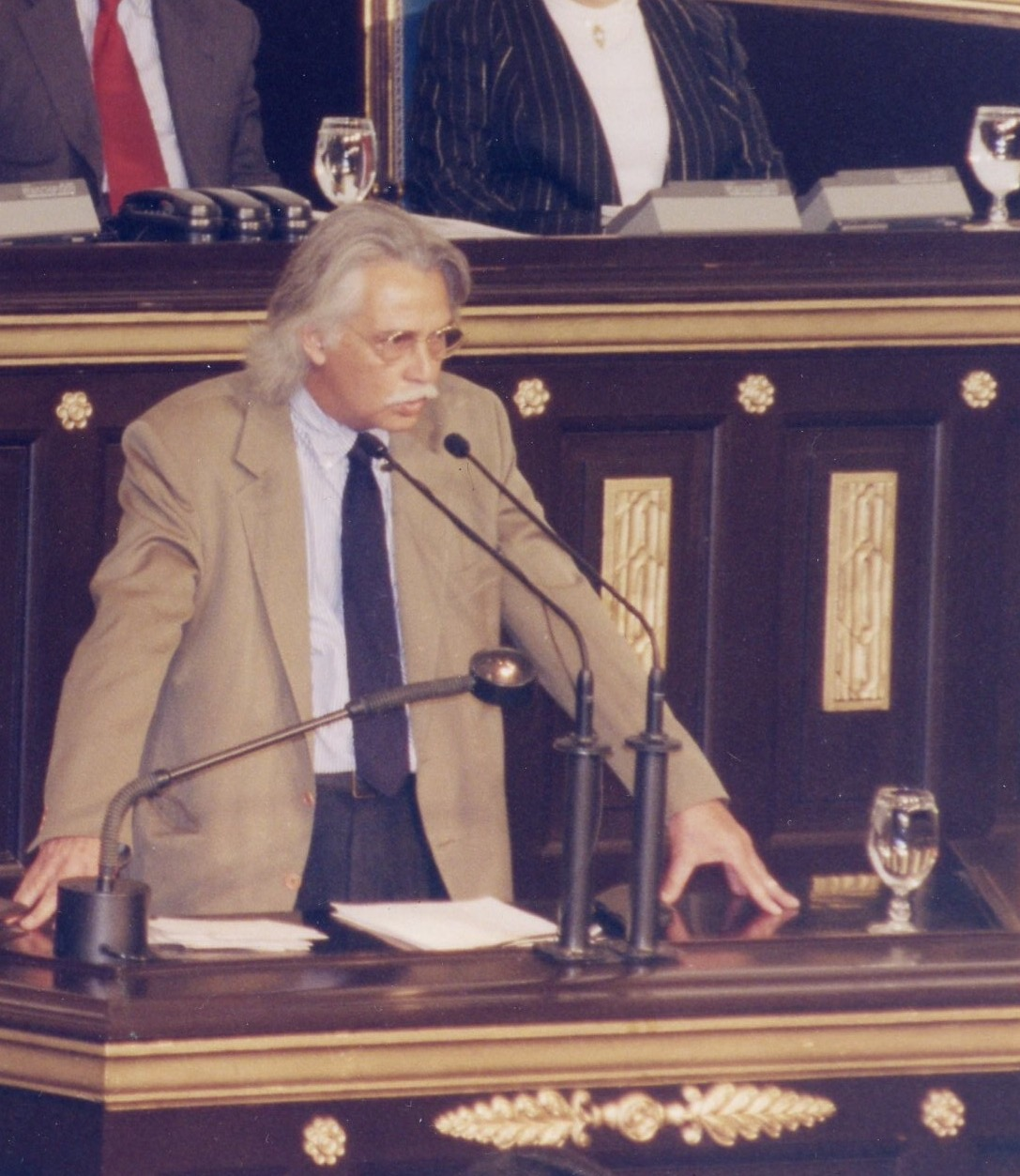 El filósofo Luis Castro Leiva como Orador de Orden en la sesión solemne con motivo de los 40 años del 23 de enero de 1958, en el Congreso Nacional.